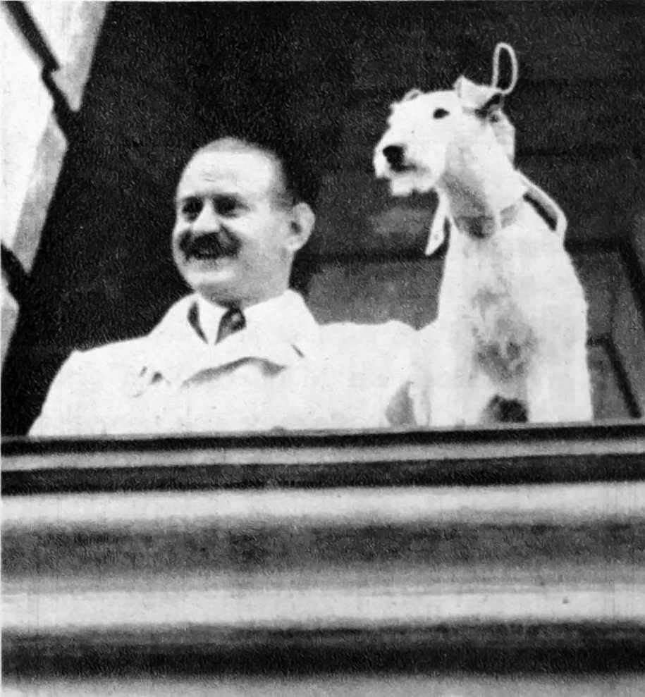 Hans Neumann mit einem seiner Foxterrier